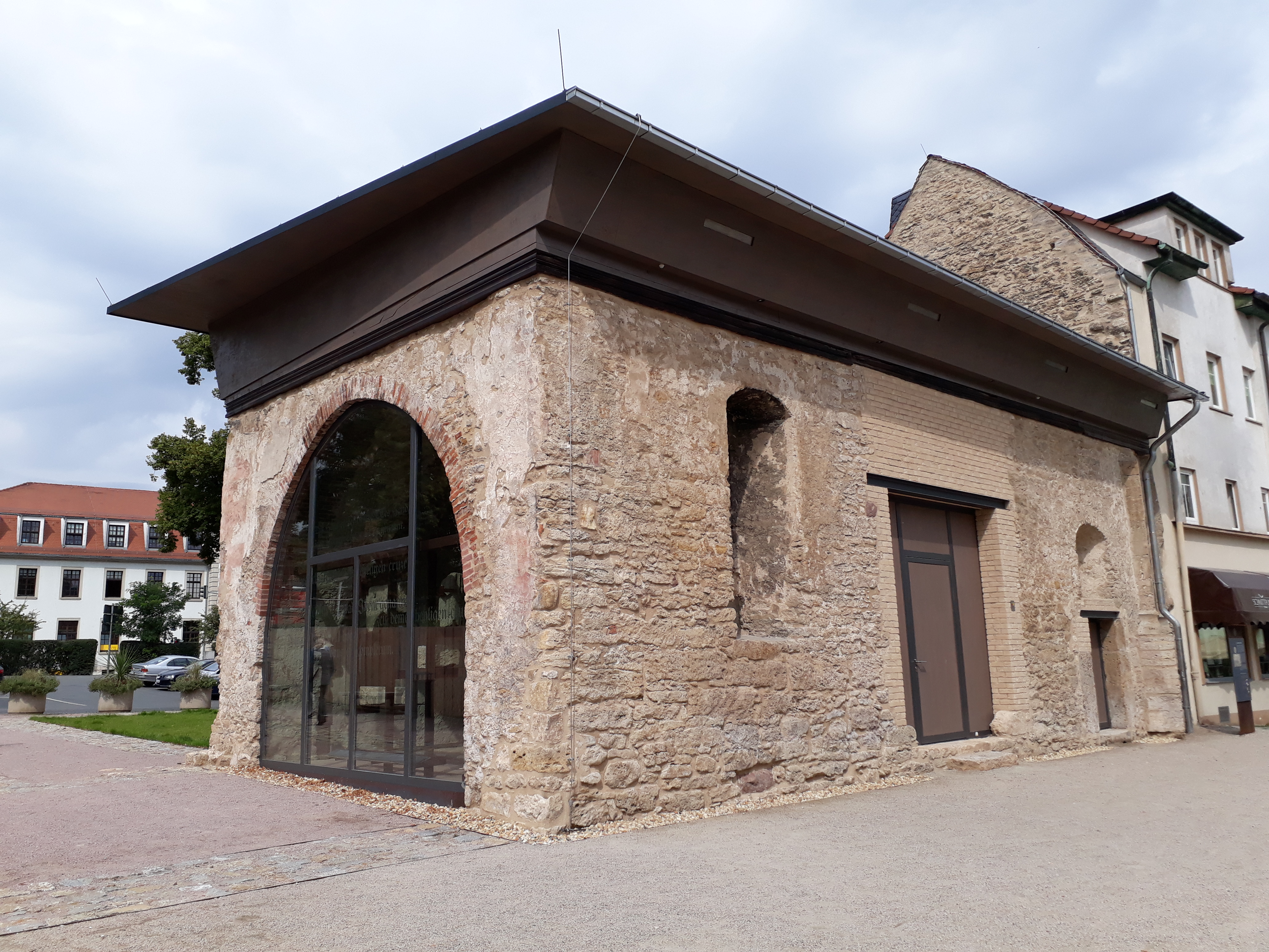 Ehemaliges Karmeliterkloster in Jena